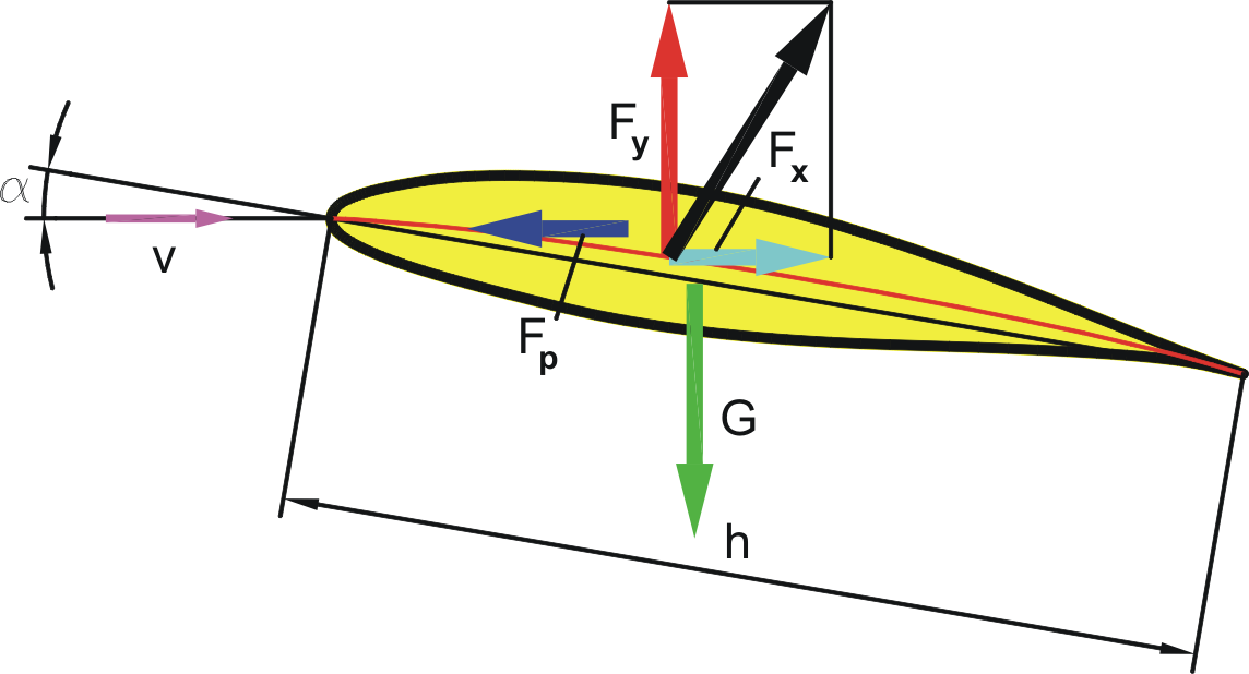 Aerodinamikai felhajtóerő